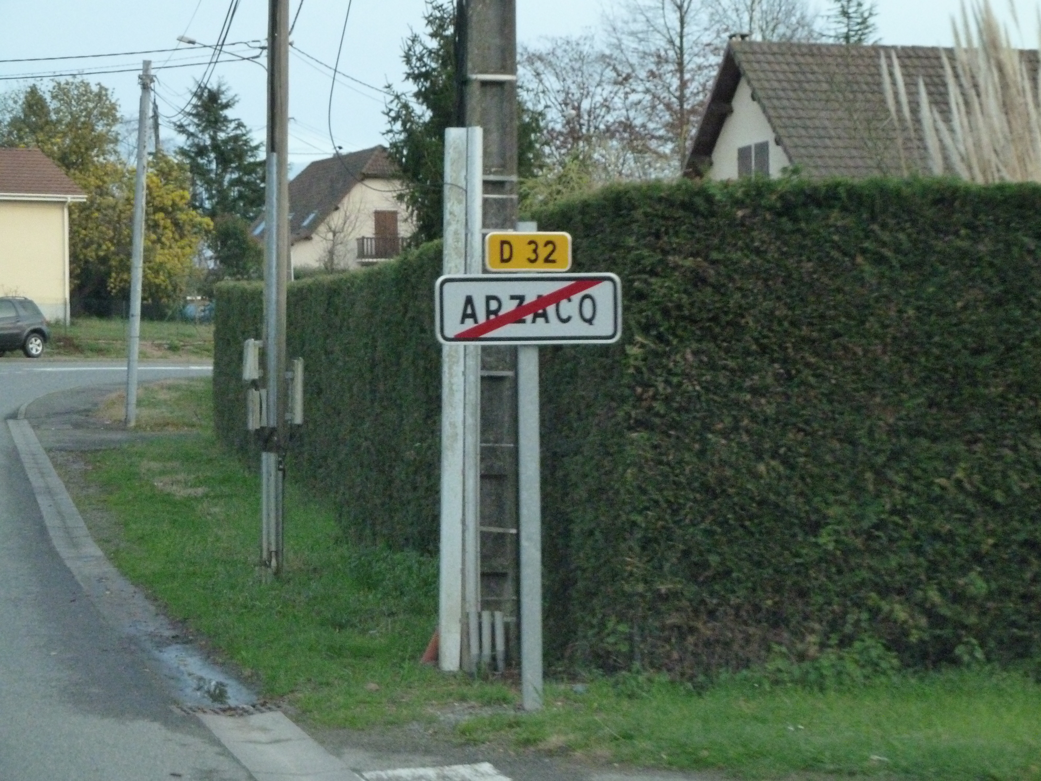 Sortie d'Arzacq-Arraziguet